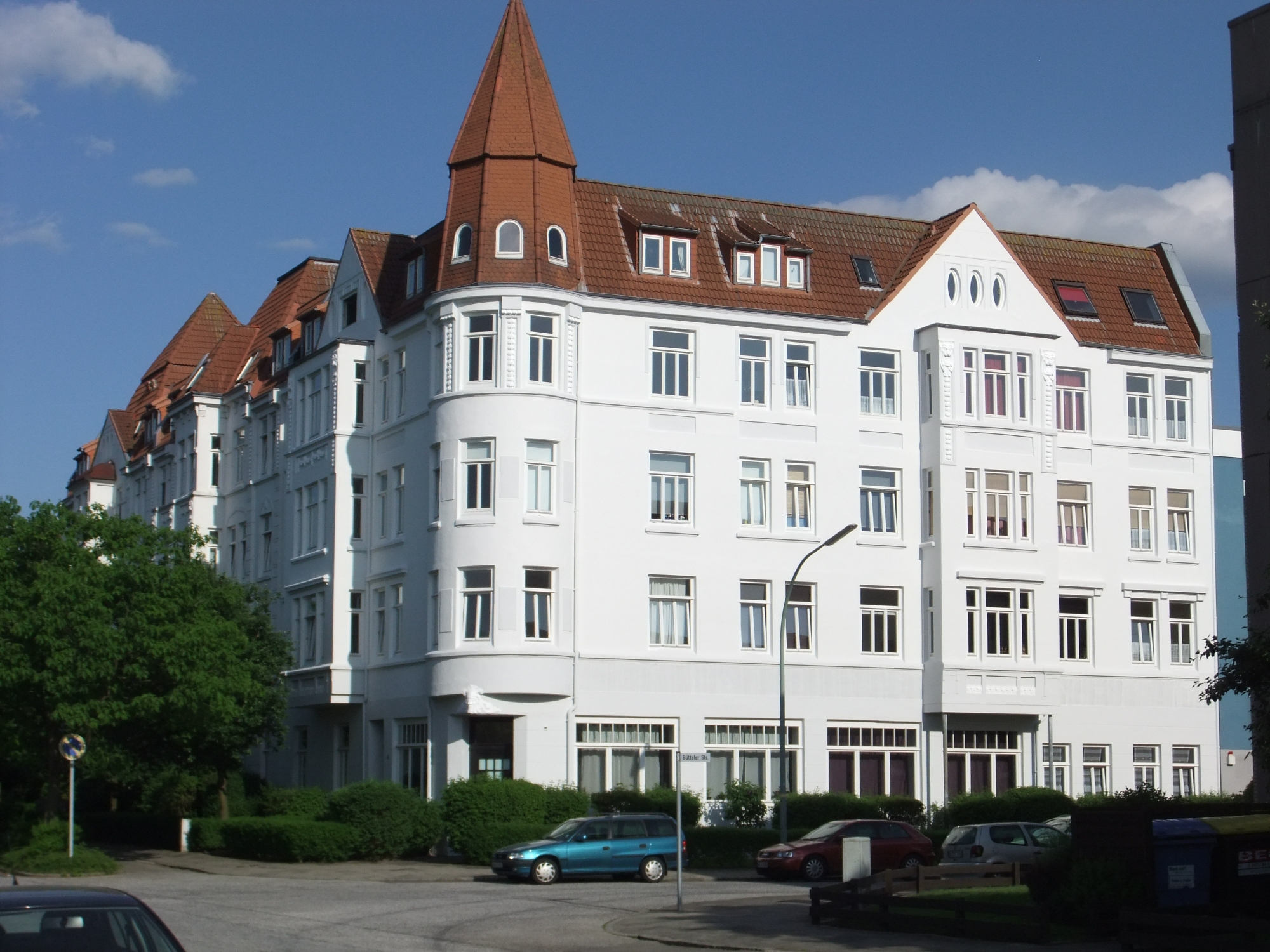 Mietshausanlage in Bremerhaven, Batteriestraße 59 . Die Gesamtanlage ist ein geschütztes Kulturdenkmal in der Freien Hansestadt Bremen, mit der Nr. 1557 beim Landesamt für Denkmalpflege registriert.